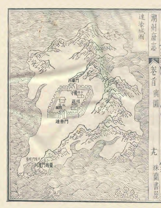 達濠城圖《潮州府志》 周硕勳 乾隆二十七年 1762年